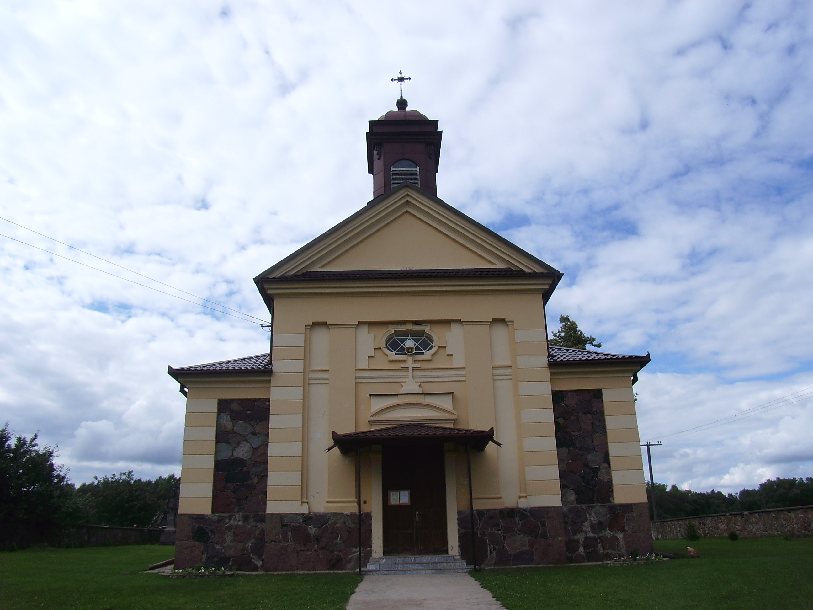 Беларуская (тарашкевіца): Касьцёл Маці Божай. в. Канстанцінава This is a photo of Belarusian heritage monument. Reference number: 613Г000654 ( WLM)